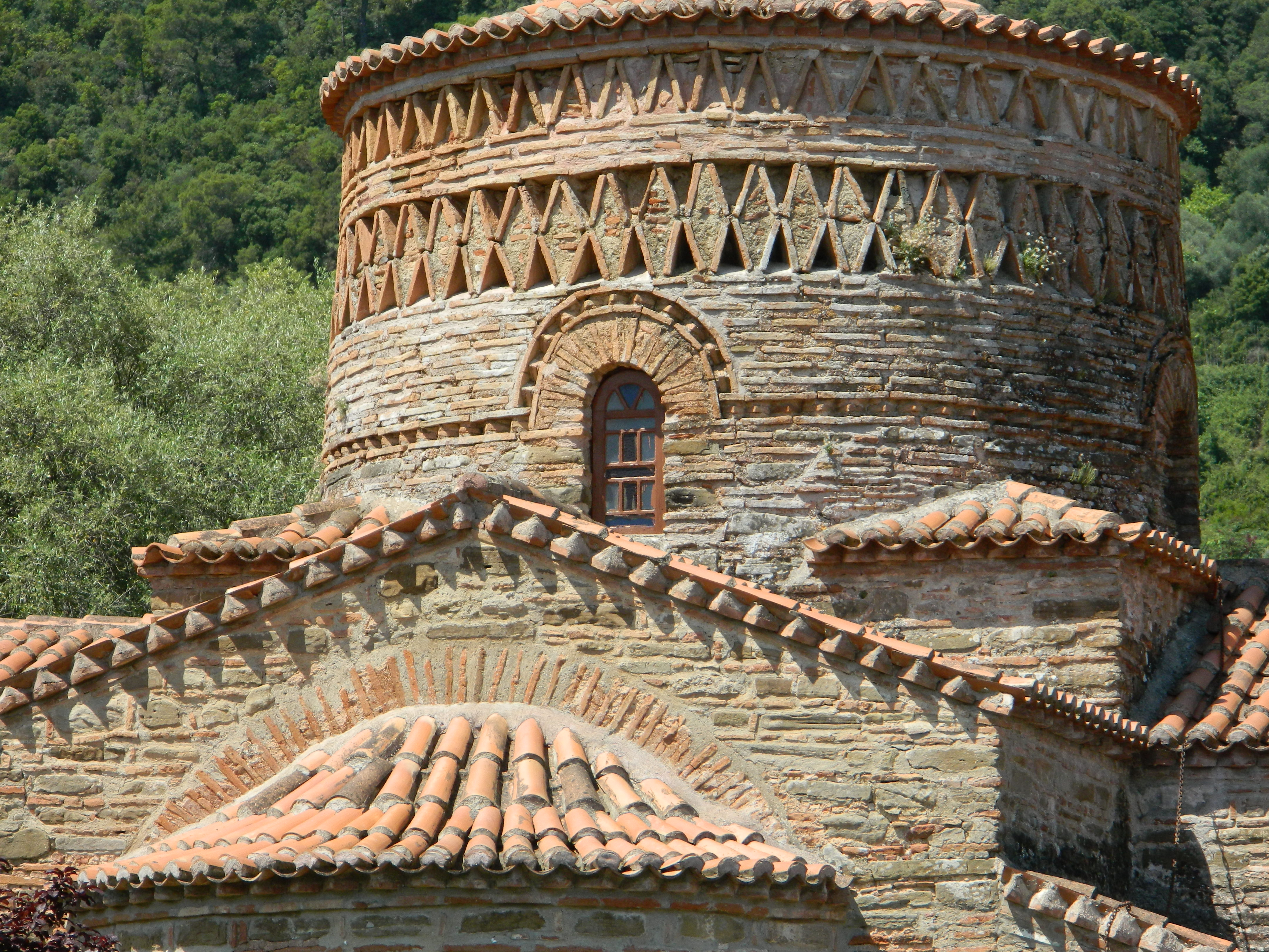 Ναός Παναγίας Παναξιώτισσας Γαυρολίμνης«Ναός Παναγίας Παναξιώτισσας Γαυρολίμνης»